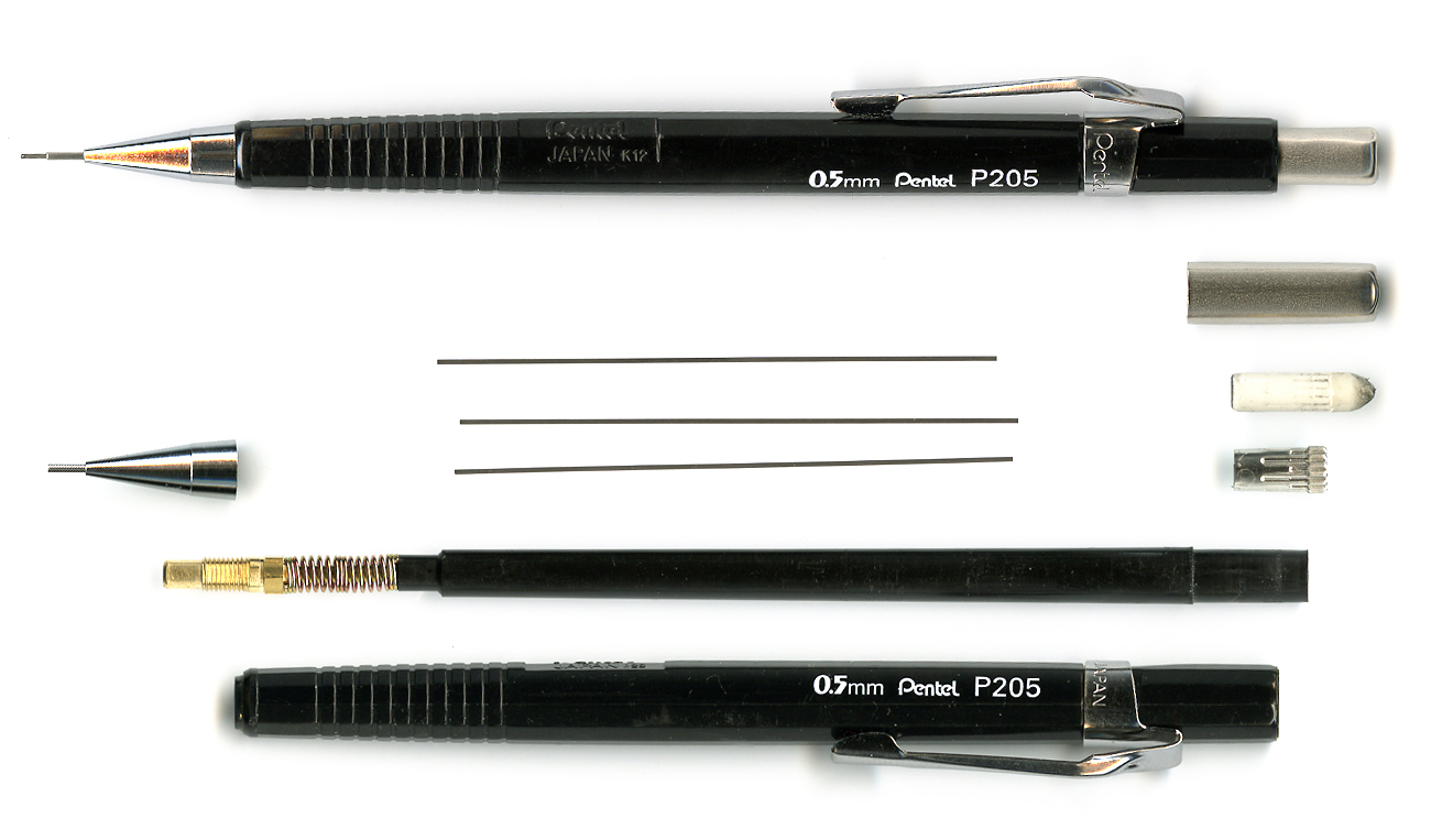 Pentel 0.5mm mechanical pencil